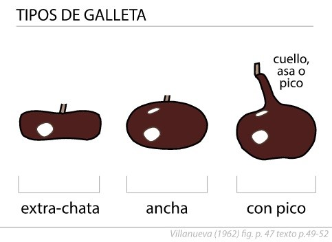 cortes galleta